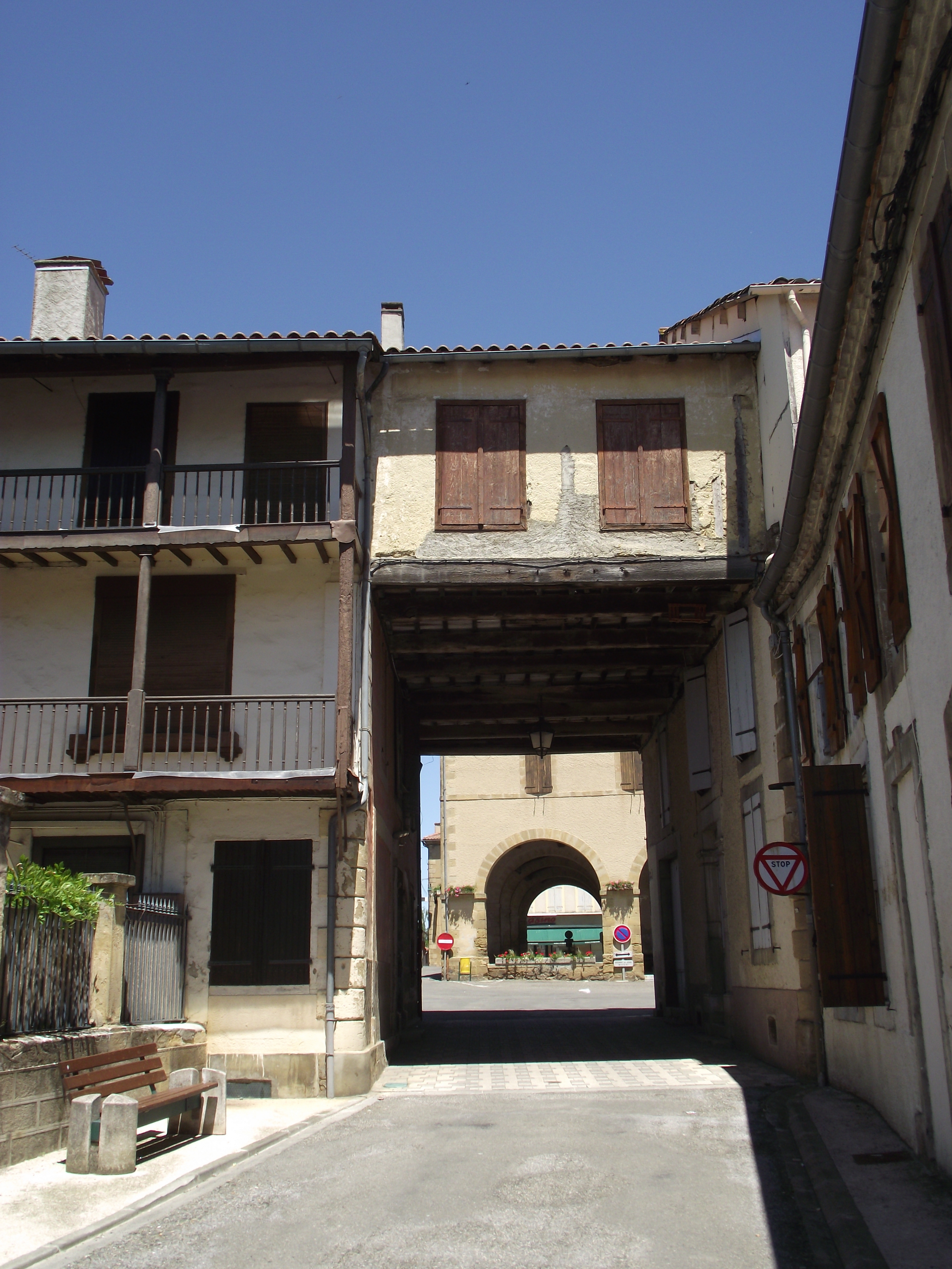 Passage couvert (rue Dargagnon, Miélan, Gers, France)